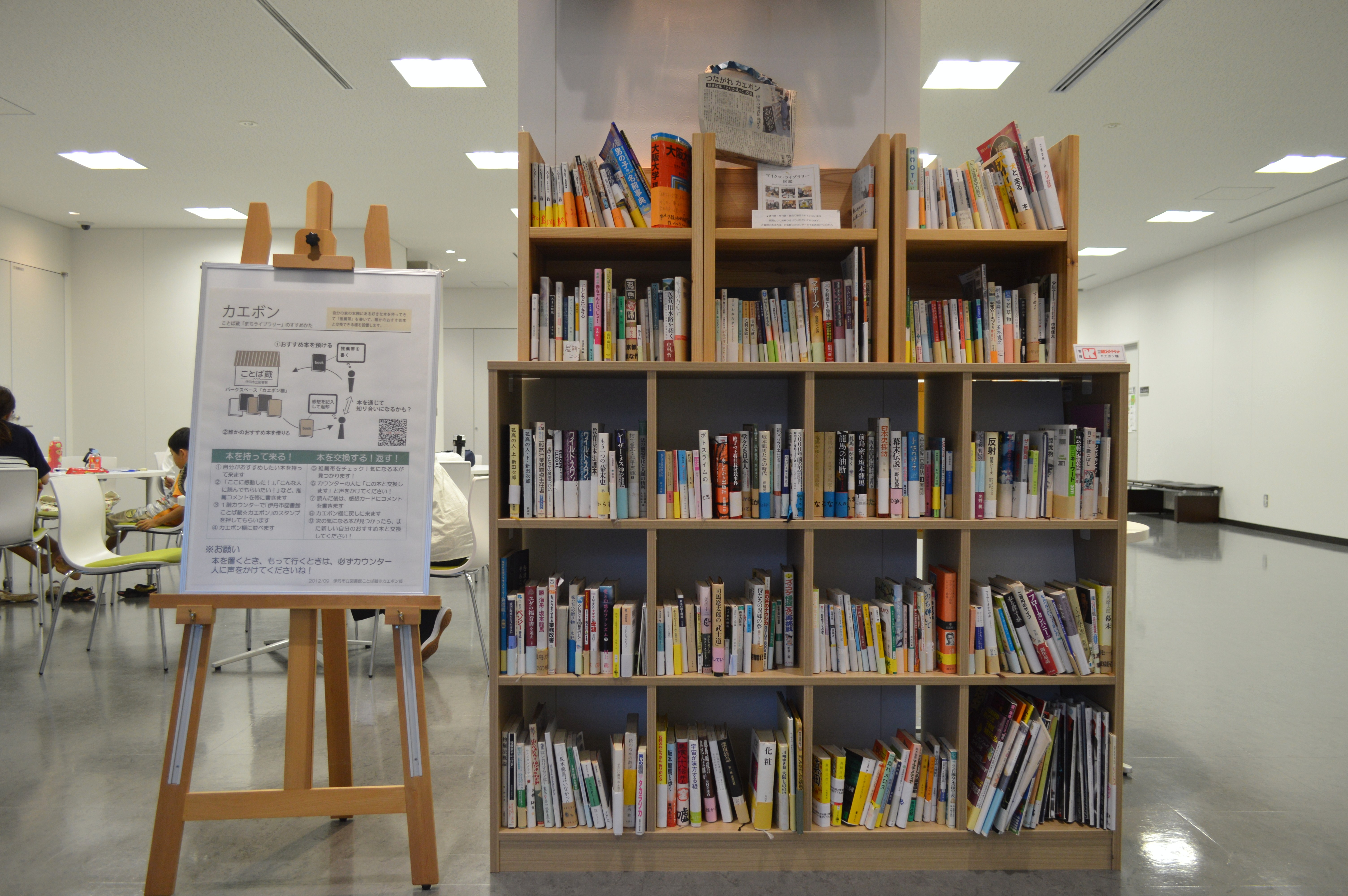 伊丹市立図書館「ことば蔵」。1階のカエボン棚。